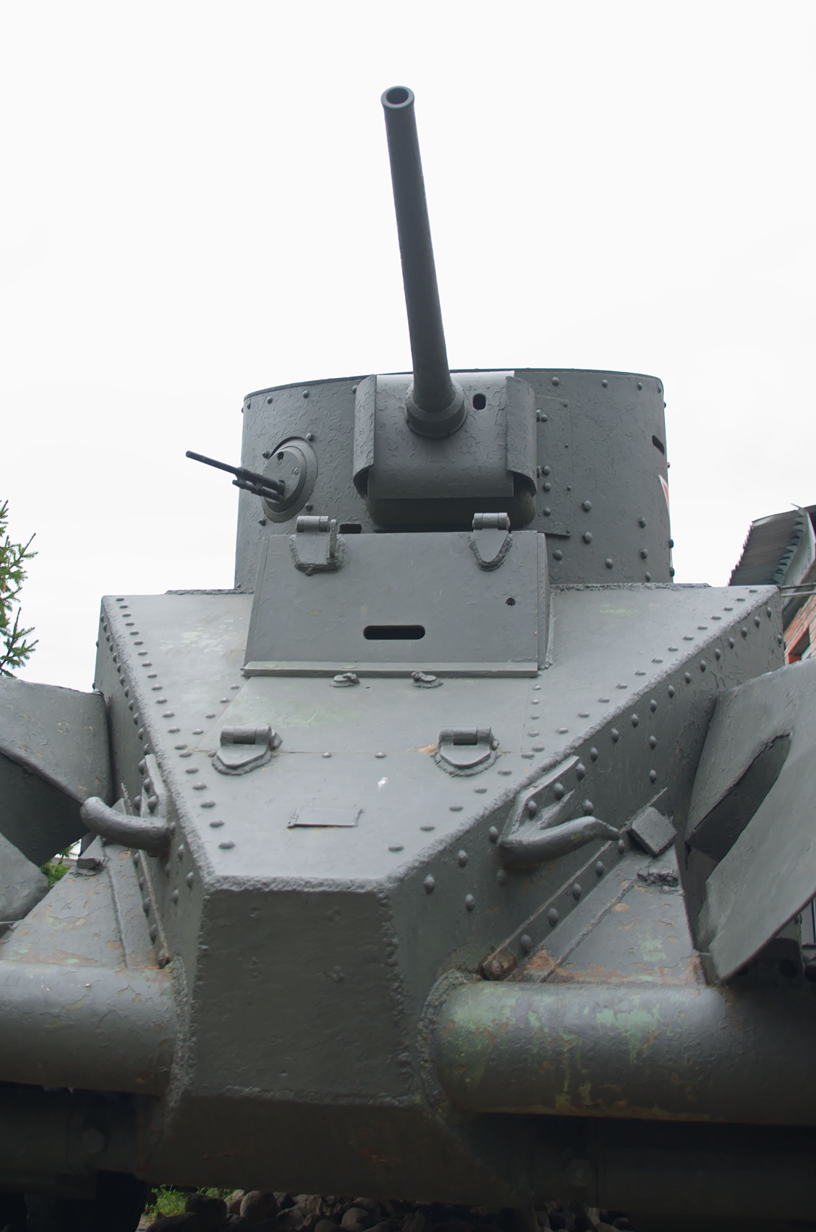 0495 - Moskau 2015 - Panzermuseum Kubinka